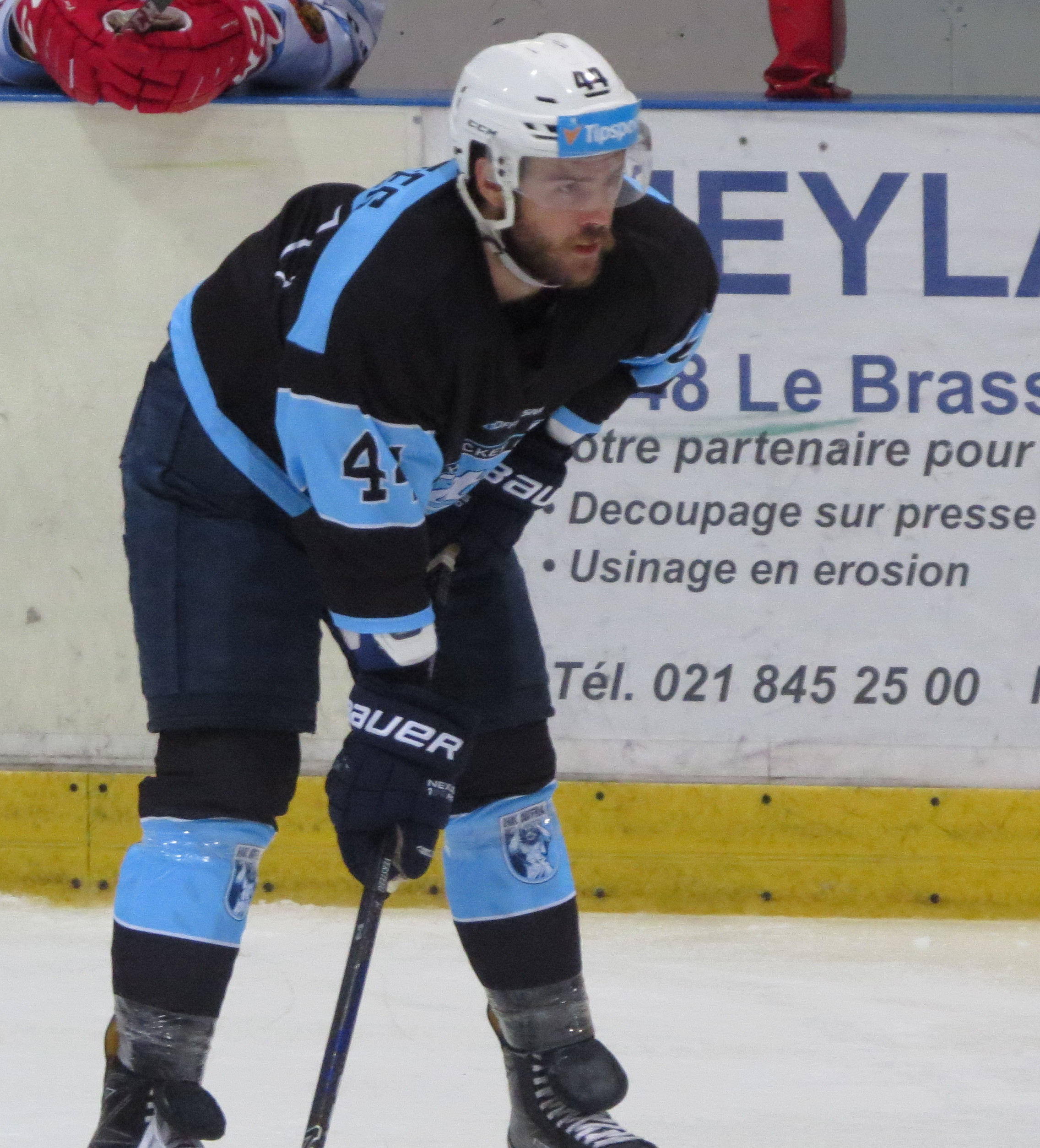 Match entre les Tigers de Langnau et Nitra le 11 août 2017 au Sentier (Hockeyades) 44 Versteeg Mitch